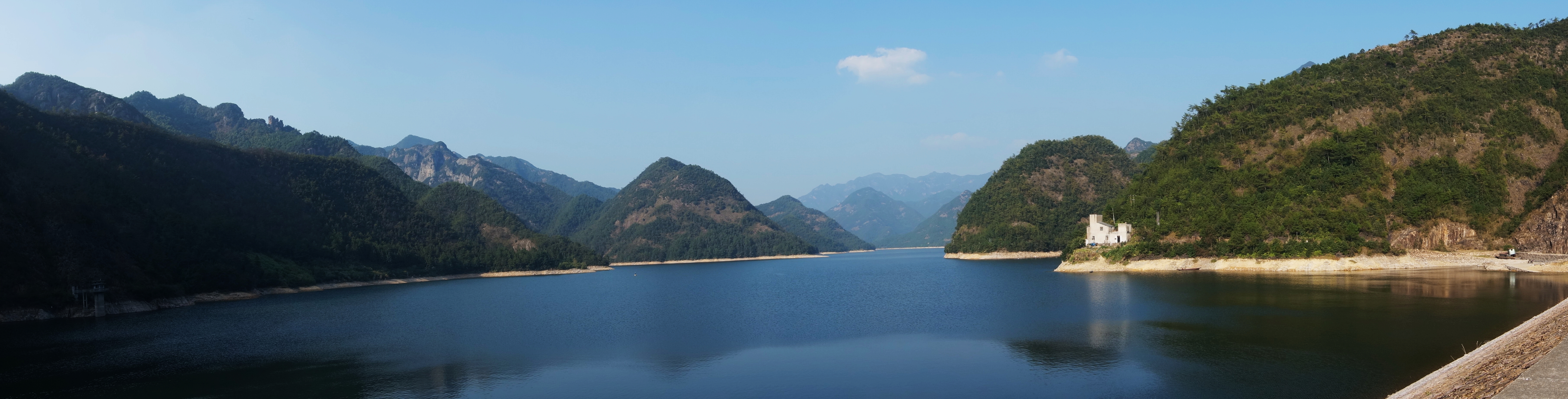 芝堰水库，自大坝北望。